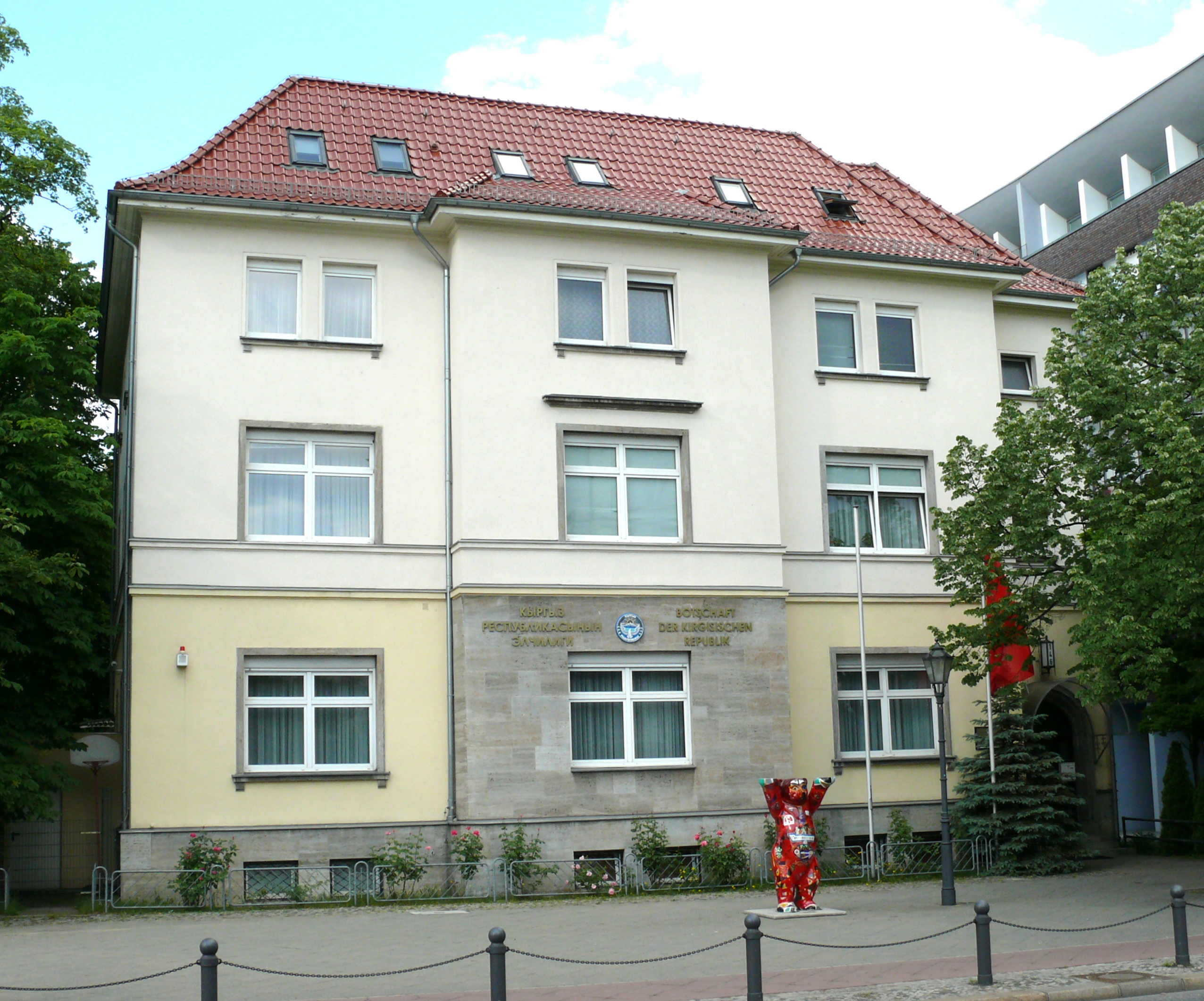 Berlin-Charlottenburg Otto-Suhr-Allee Botschaft Kirgisistan